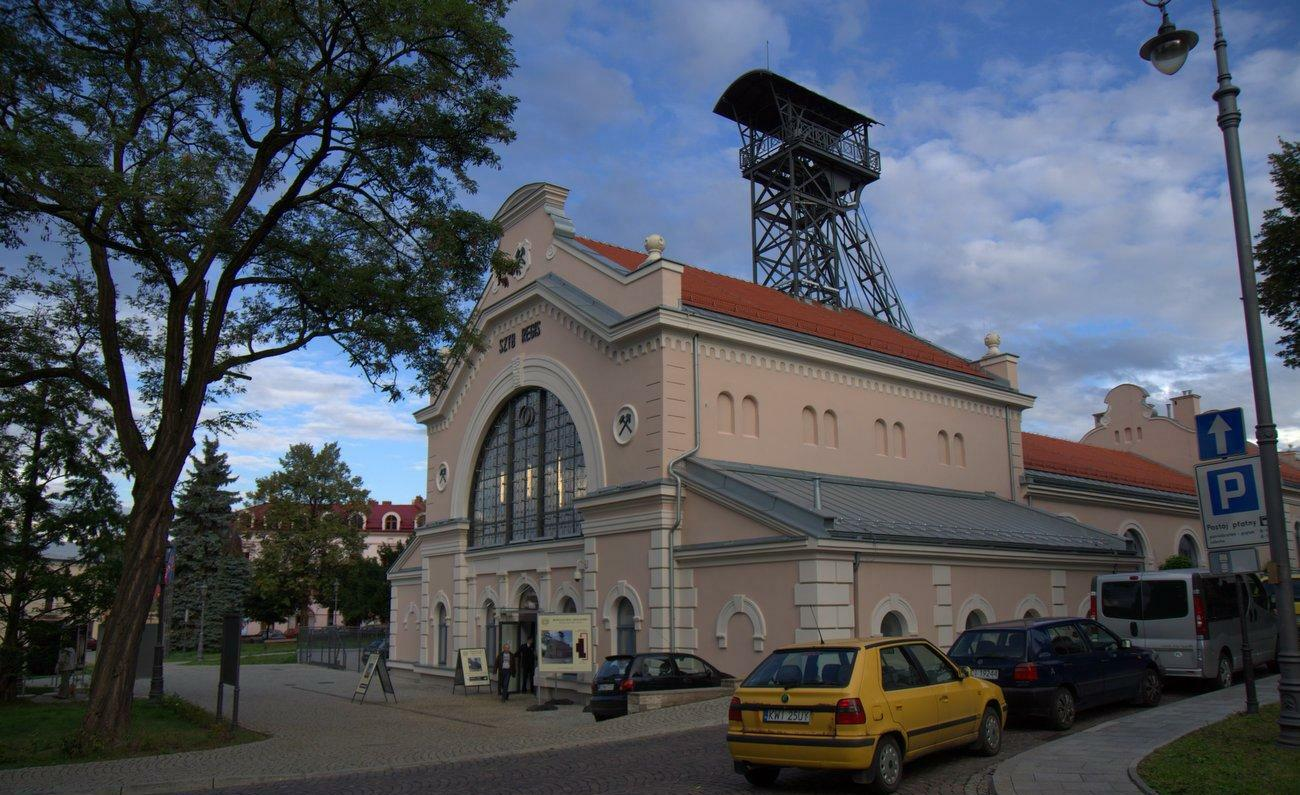 Nadszybie Szybu Regis. Szybem tym w dół kopalni soli w Wieliczce zjeżdżają turyści udający się na zwiedzanie kopalni trasą górniczą, gdzie podziemia przemierza się ubranym w kombinezon górniczy, w kasku i z lampką górniczą. Szybem tym czasami wyjeżdżają także na powierzchnię grupy turystyczne, które następnie są 'odprowadzane' przez przewodników na początek trasy do Szybu Daniłowicza.